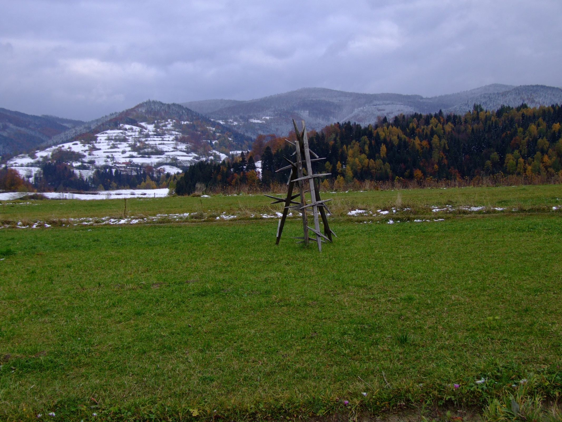 Beskid Wyspowy (Krzystonów, Jasień), widok z zachodniej strony.